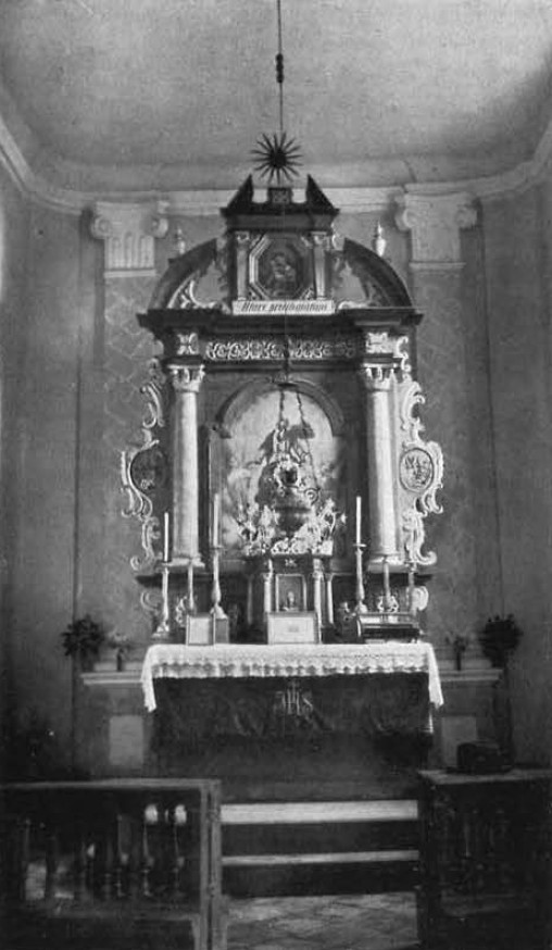 Abb. 270. Pröles. Der Altar der Filialkirche.